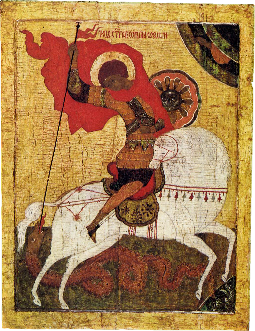 Икона «Чудо Георгия о змие». Из собрания И. Остроухова. XV век. Новгородская школа. 82х63. Третьяковская галерея, Москва. Один из самых прекрасных образов Георгия в русской иконописи. В стремительности коня — отголоски новгородских росписей XIV века. В иконе примечательно не только отступление от первоначальной графьи, но и самый перевод, восходящий к ранневизантийской пластике Барберини. Литература: Алпатов М. Образ Георгия-воина Византии и Древней Руси. — «Этюды по истории русского искусства», т.1, стр. 154—169